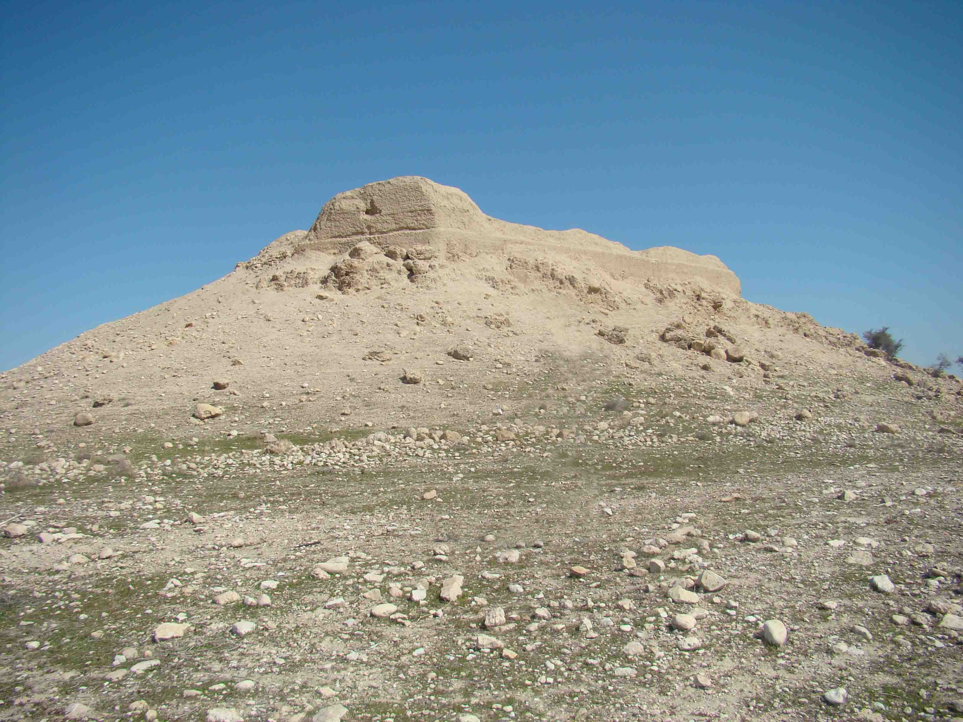 آتشکده اذرفرنبغ کاريان